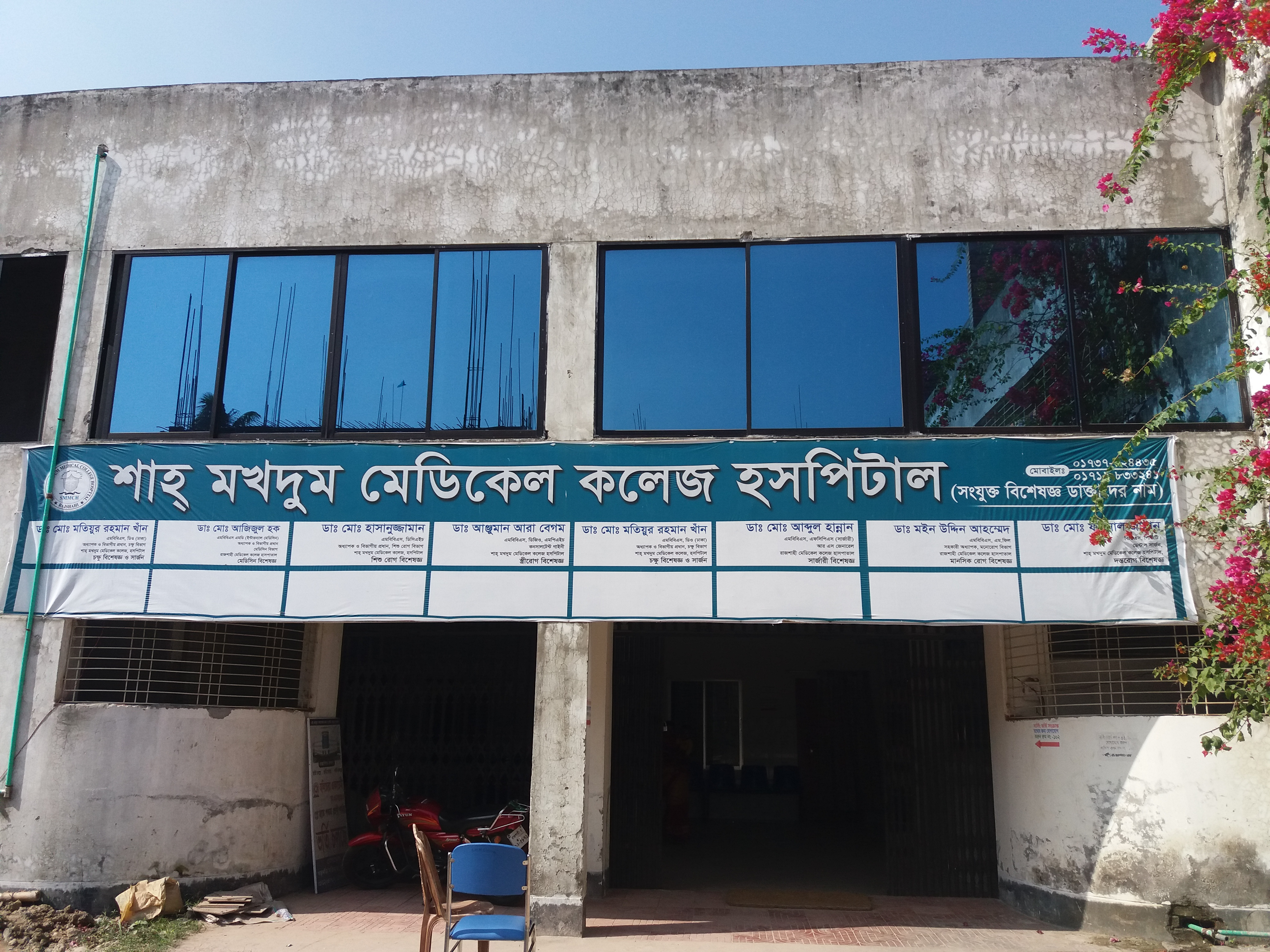 শাহ মখদুম মেডিকেল কলেজ